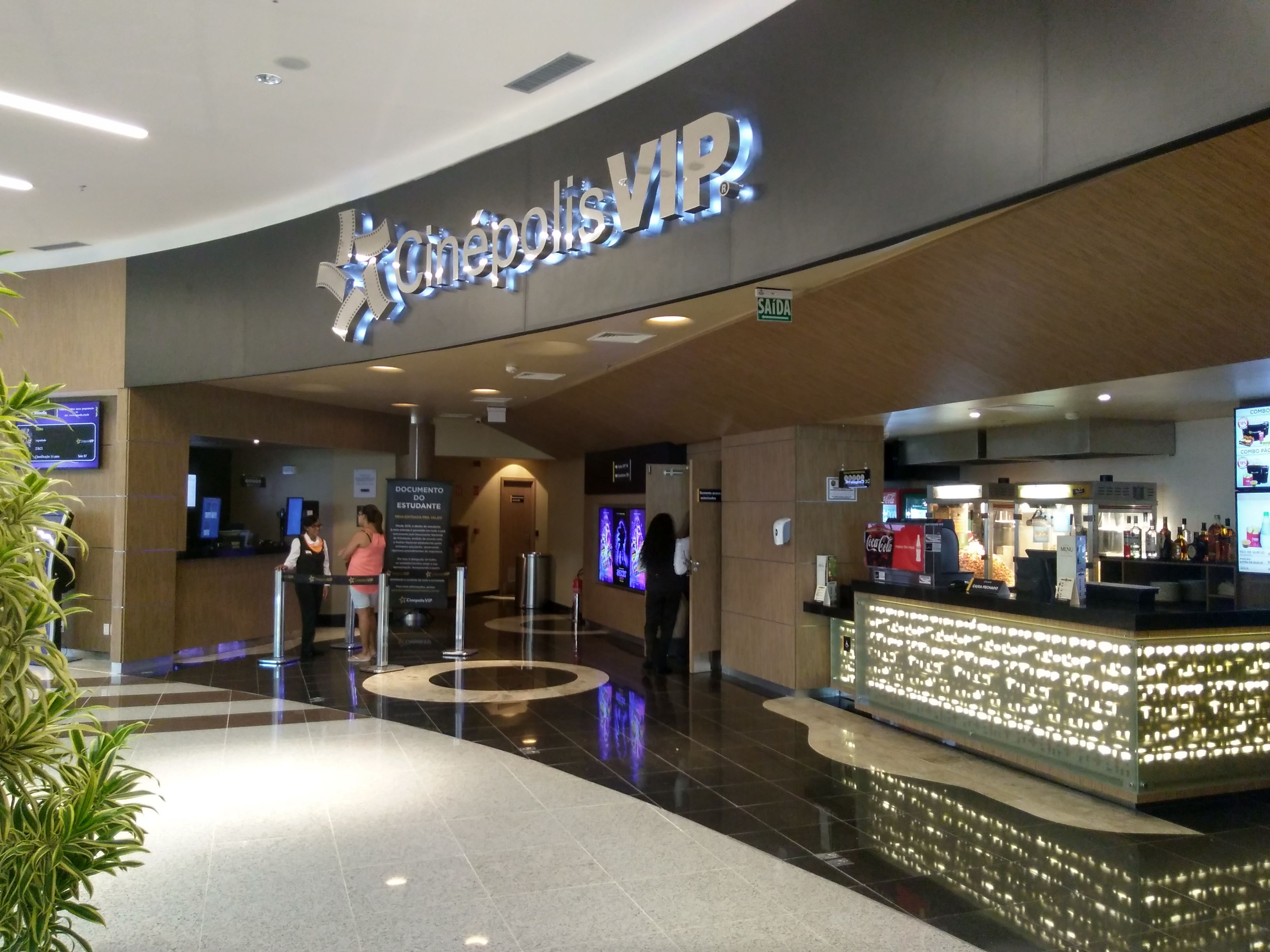 Fotos internas e externas do complexo Vip de cinemas Cinépolis Salvador Norte Shopping, de Salvador - BA